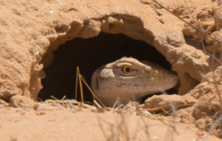 ראשו של כוח אפור צעיר המציץ ממאורתו, צולם בחולות ניצנה